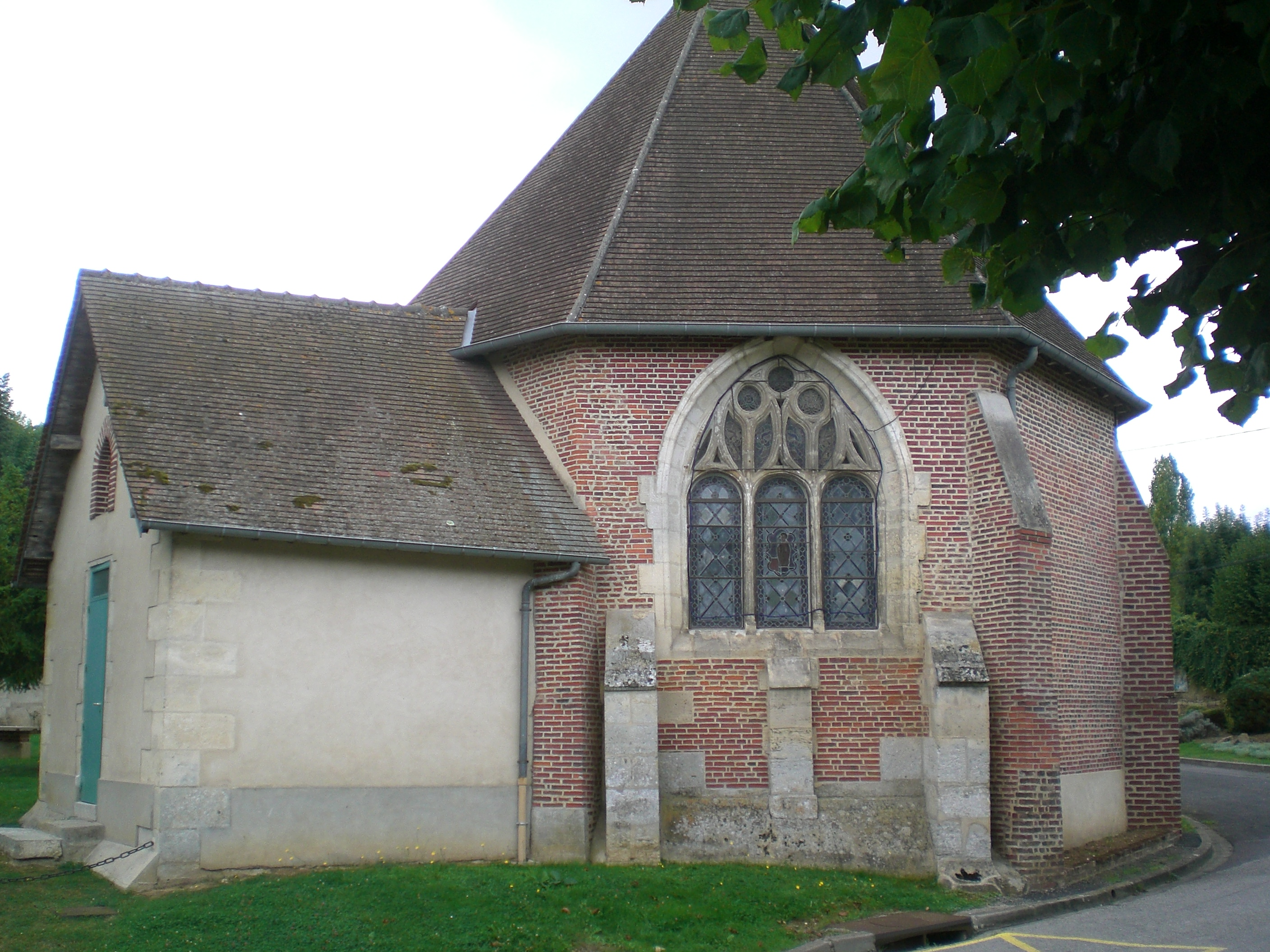 eglise d'anserville